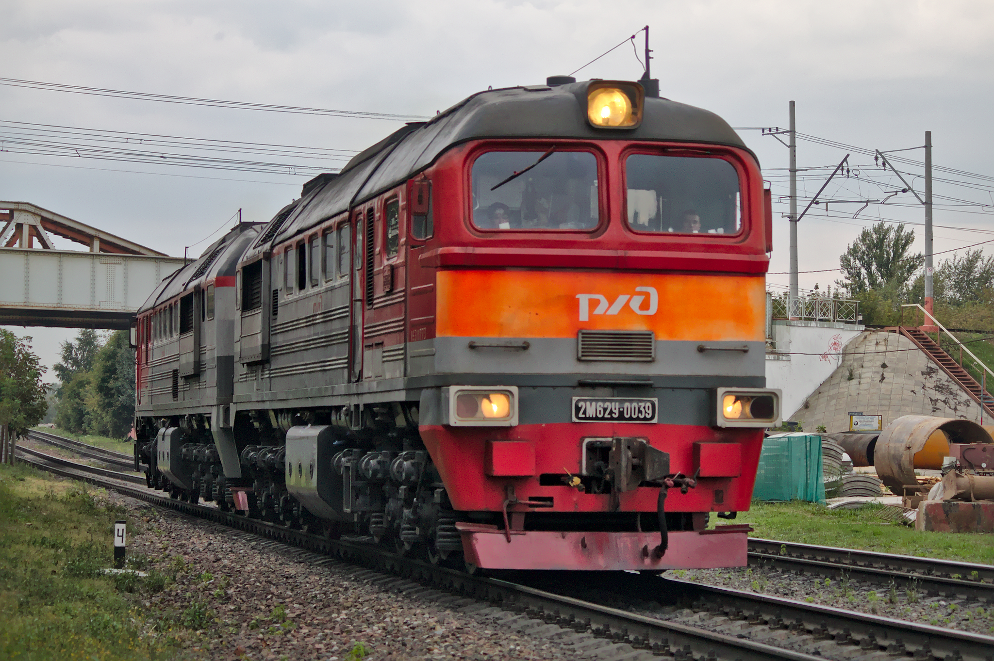 2М62У-0039, Владыкино, Москва. см. фото 531065 в альбоме автора